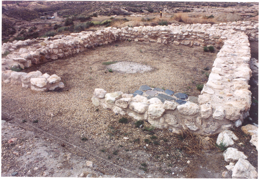 Los Millares, casa cuadrada con hogar central (Yacimiento Arqueológico de Los Millares, Gador, Almería)